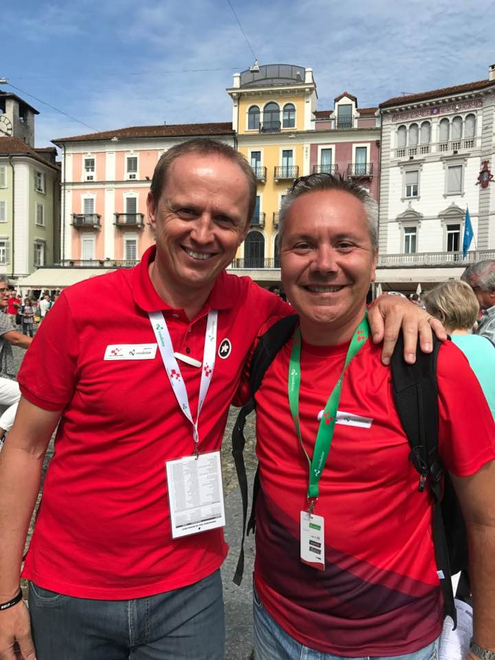 Kurt Betschart, ehem. Radrennfahrer, heutiger Sportdirektor der Tour de Suisse, mit Stefano Bertolotti, Pressesprecher der UEC